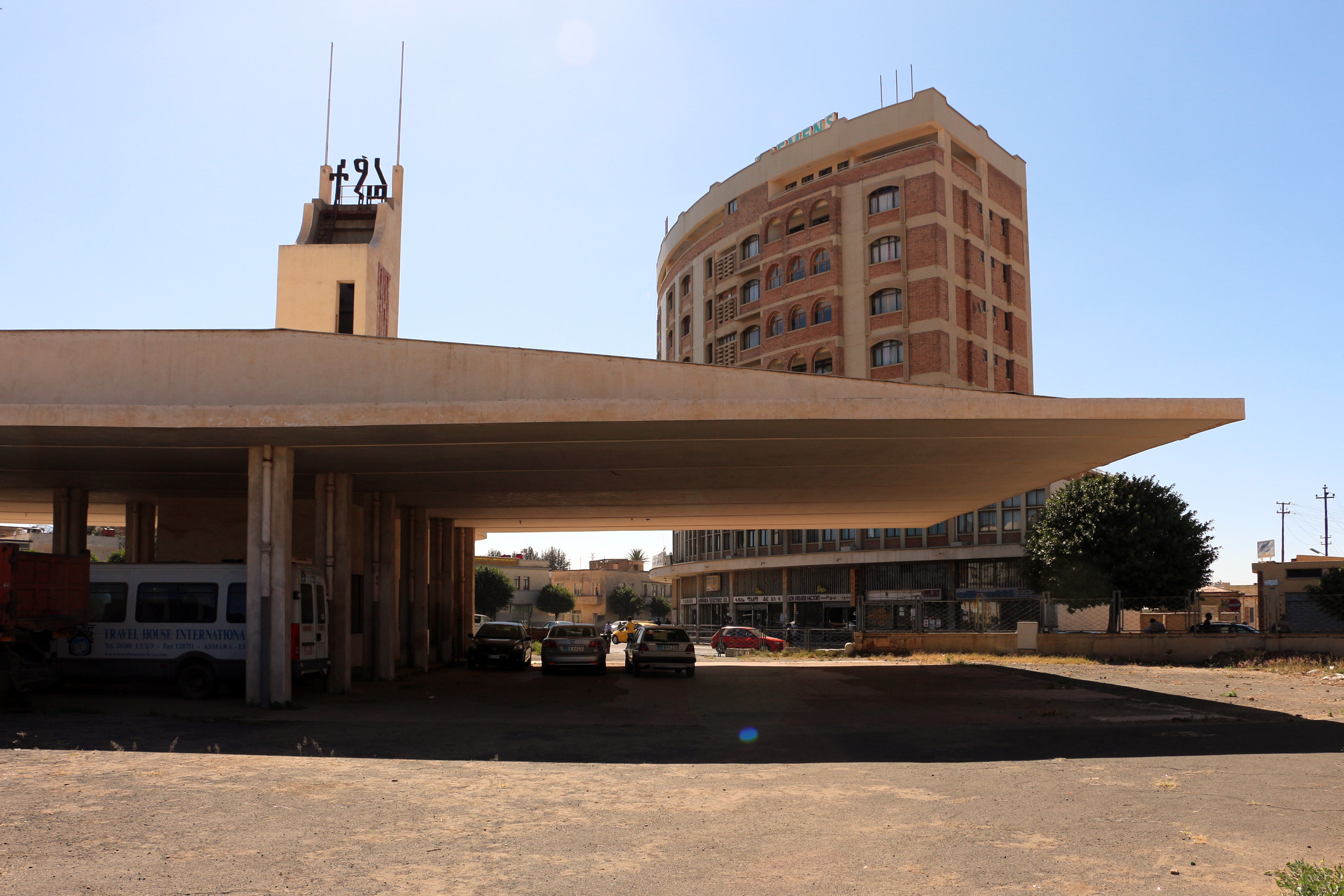 Fiat tagliero, 15 retro.JPG